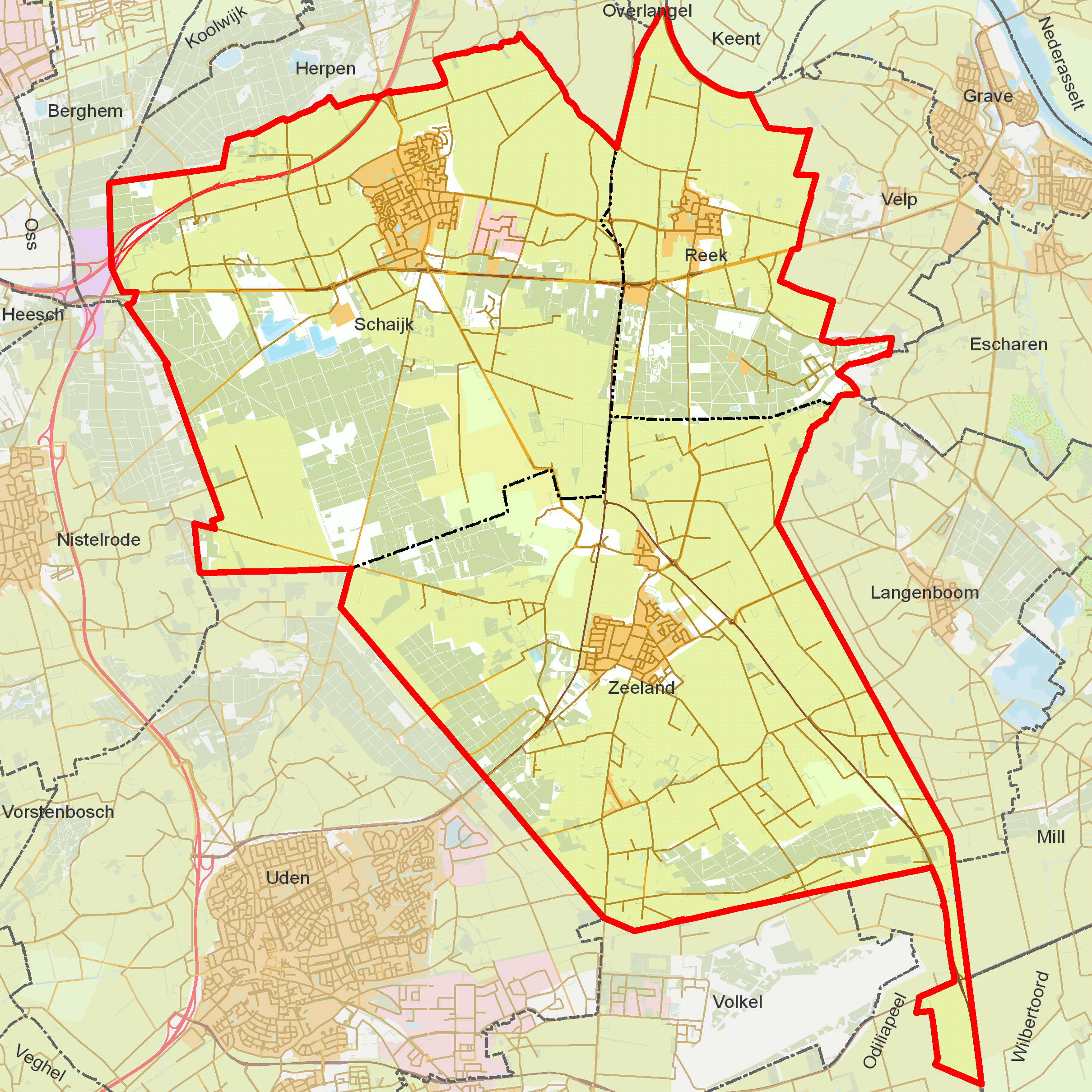 BAG woonplaatsen - Gemeente Landerd.png